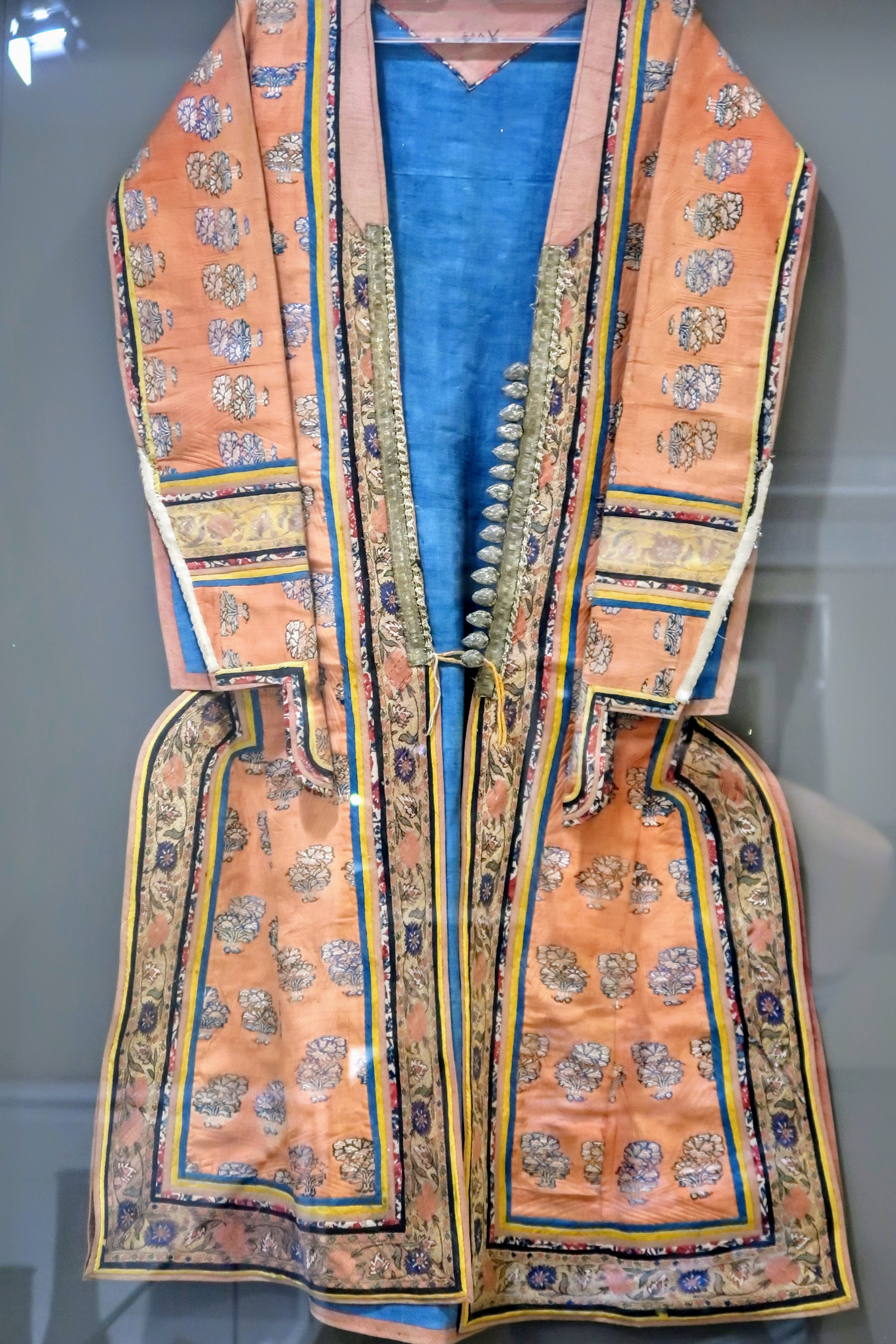 قبای اطلس قرن یازدهم هجری قمری